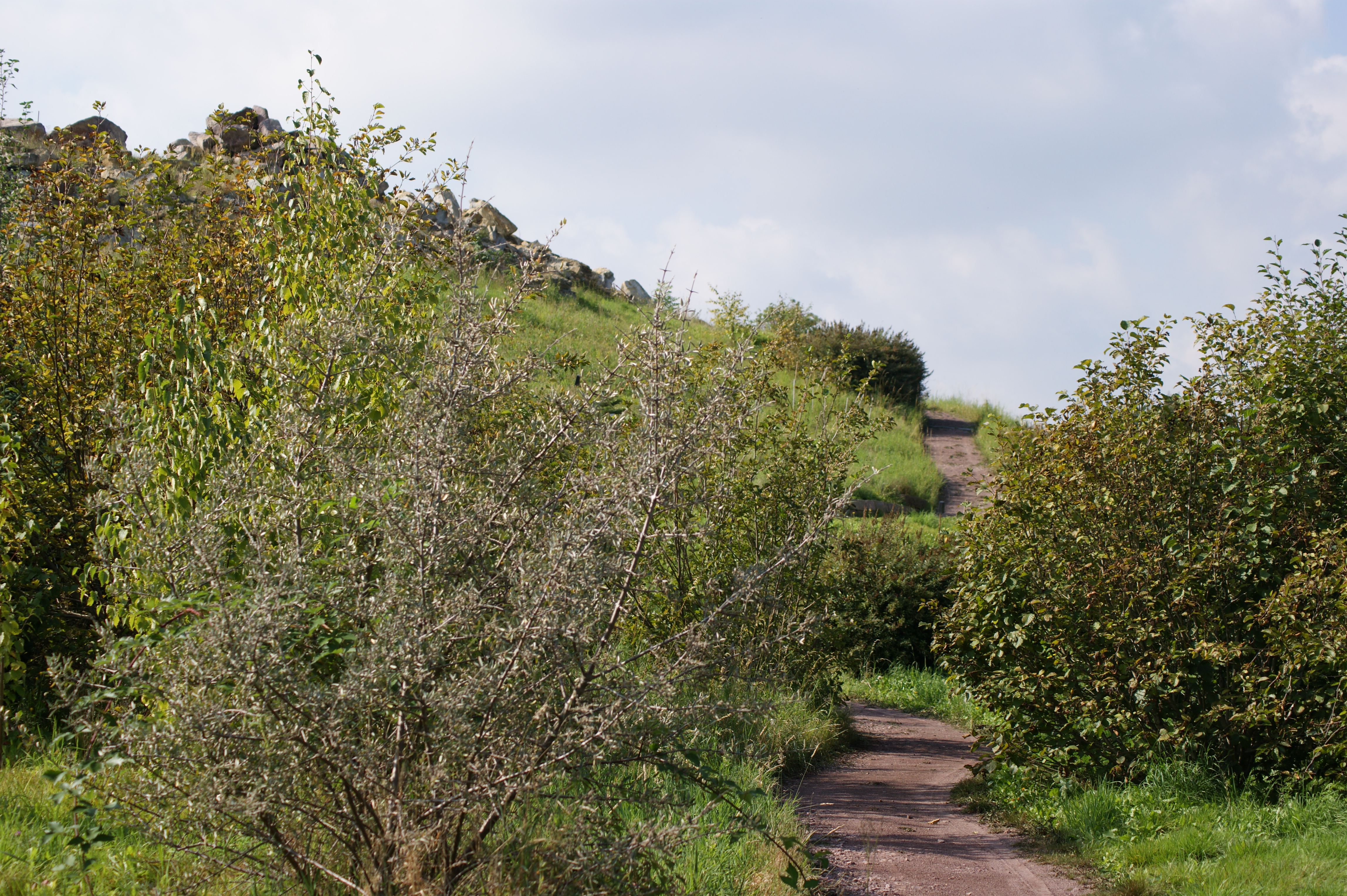 Tharandt, Forstbotanischer Garten (Landesarboretum): Pfad durch die „Rocky Mountains“